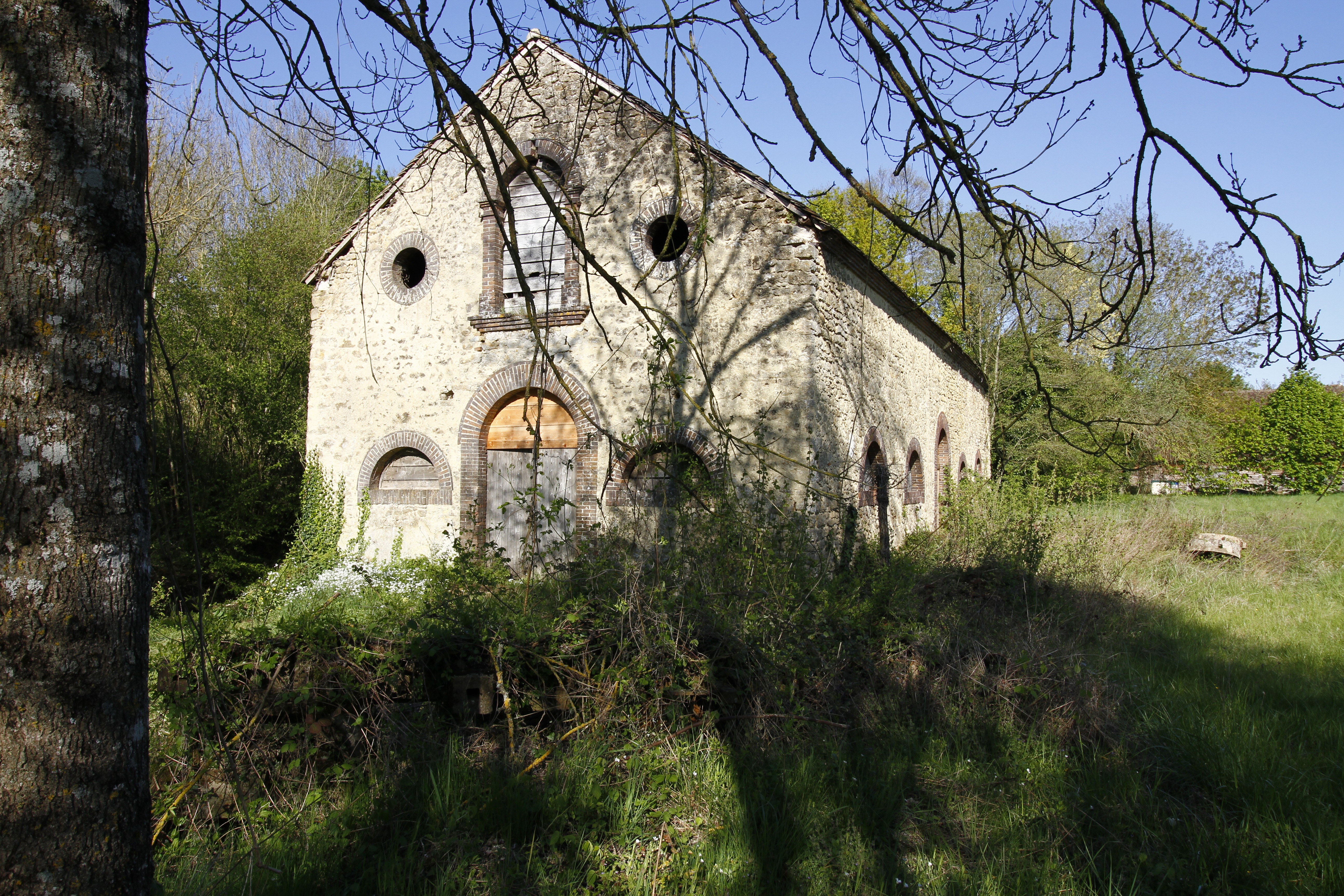 Les forges de Cormorin à Champrond - Commune de Sarthe